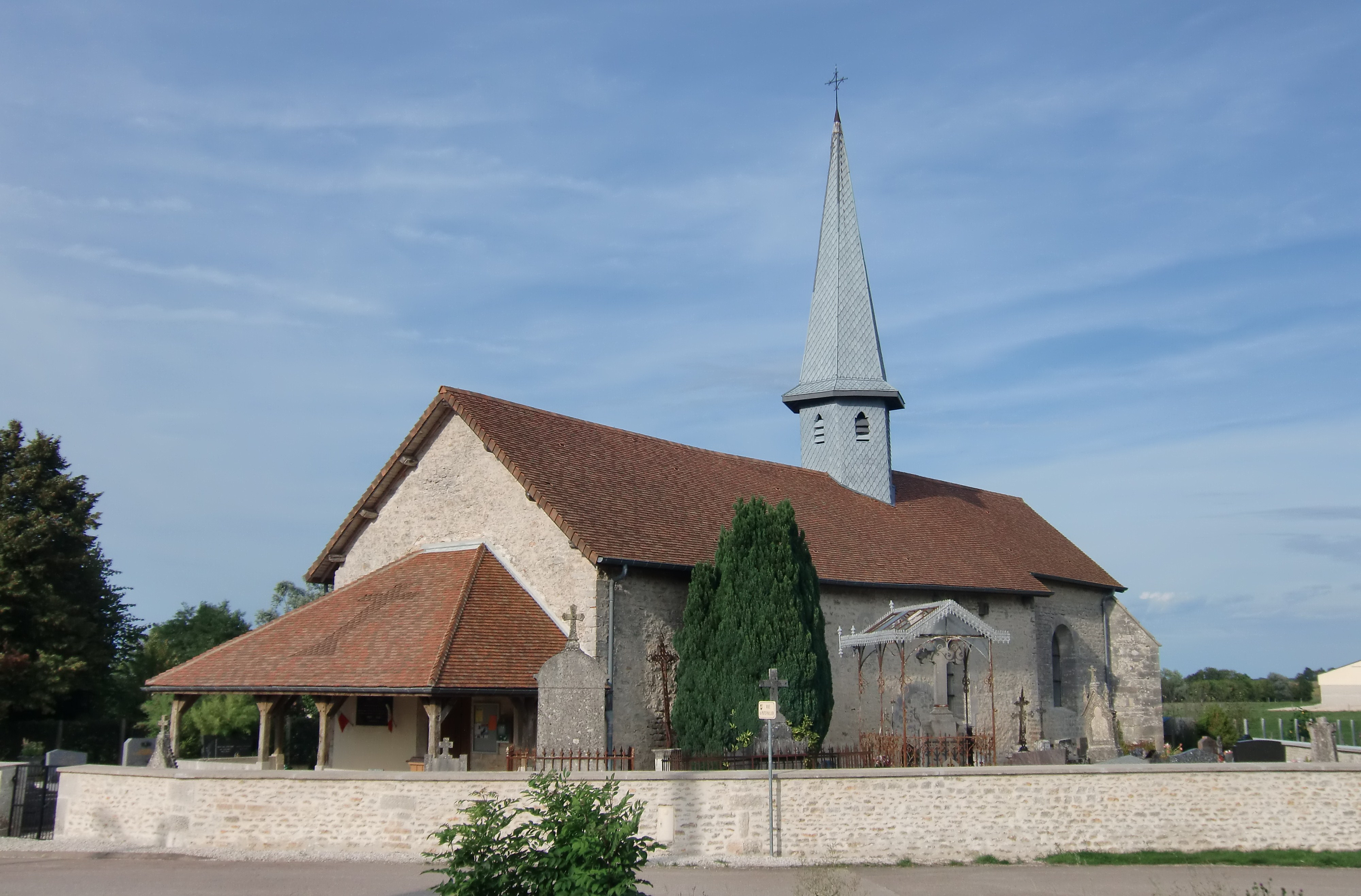 église de Chaumesnil (Aube, France)